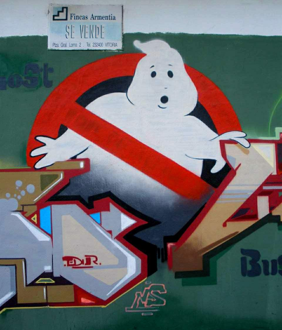 Graffiti en Vitoria-Gasteiz